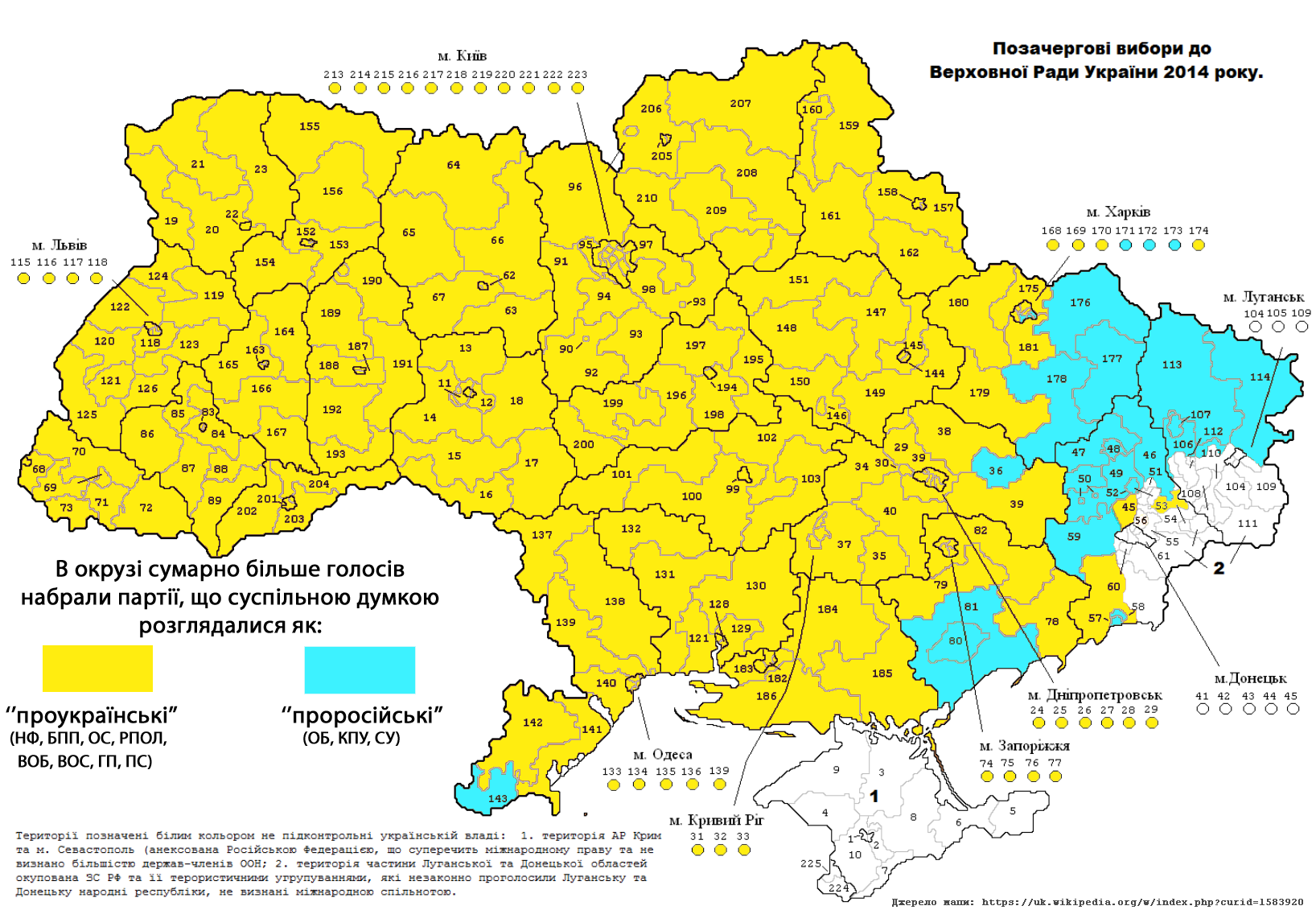 Вибори до ВРУ 2014. Результати партій за ідеологічними переконаннями за округами